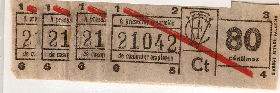 Billetes de la Compañía de Tranvías y Ferrocarriles de Valencia.